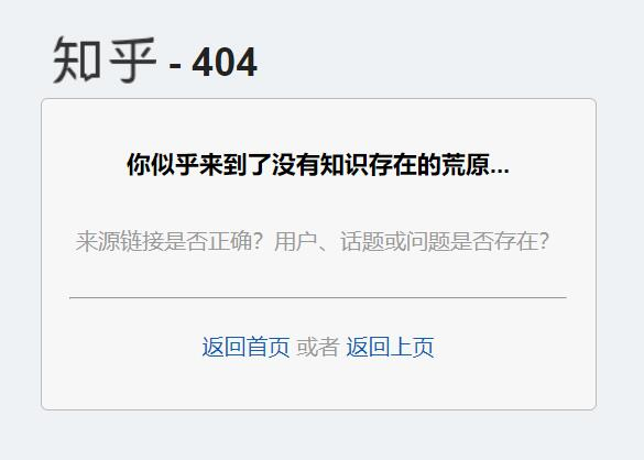 中文（中国大陆）: 知乎404的屏幕截图